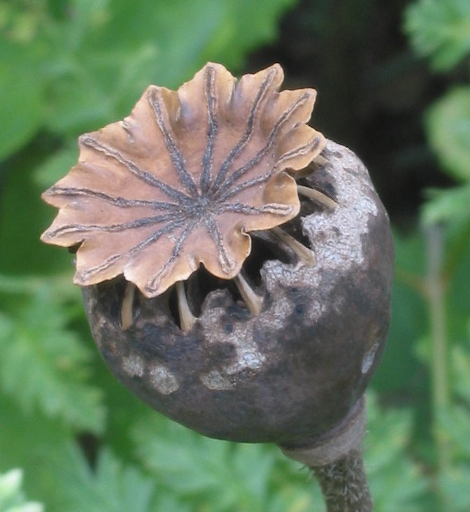 Papaver somniferum, zelfgemaakte foto van papaverbol met open poriën; begin augustus.